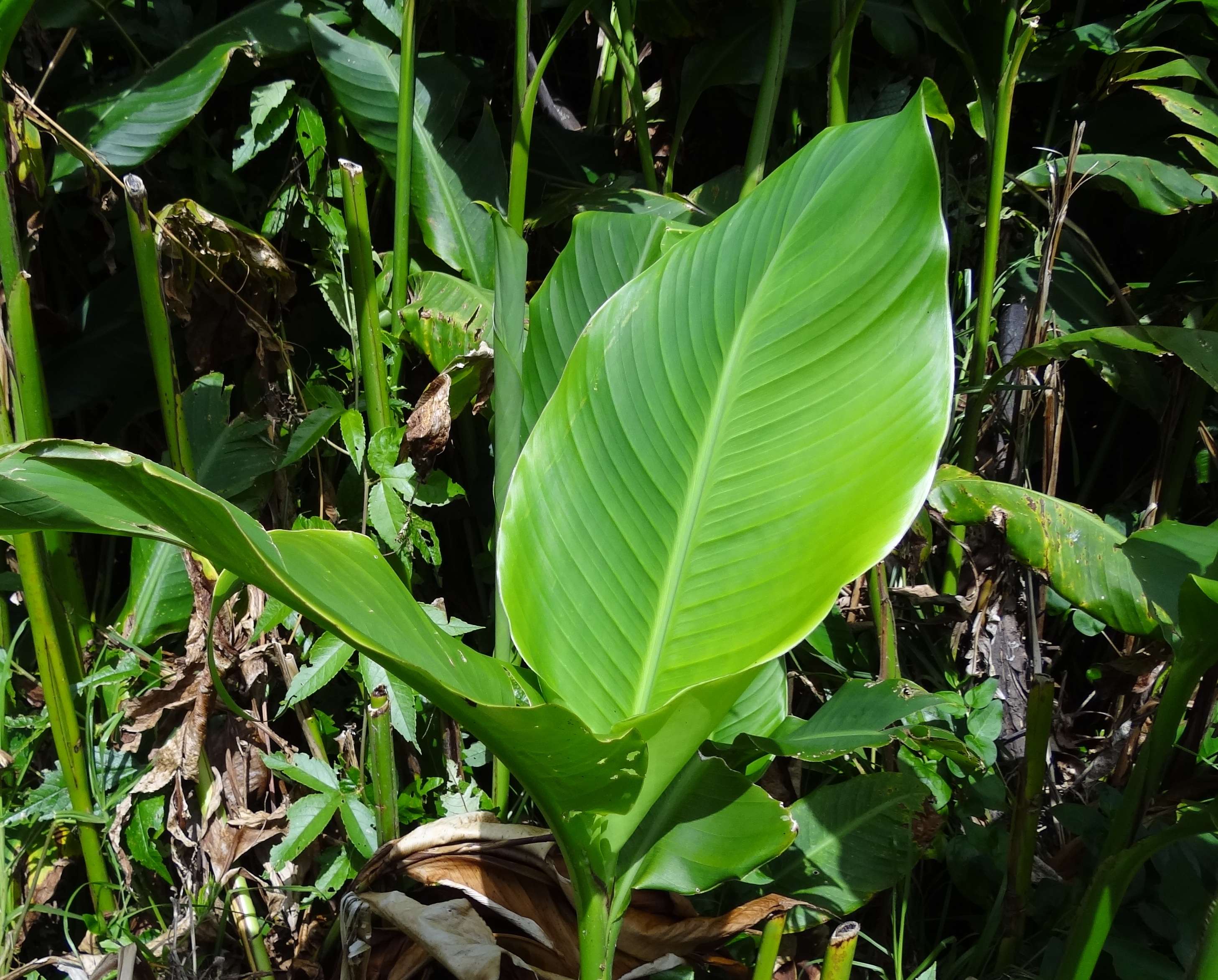 Hoja de caña india (canna indica)